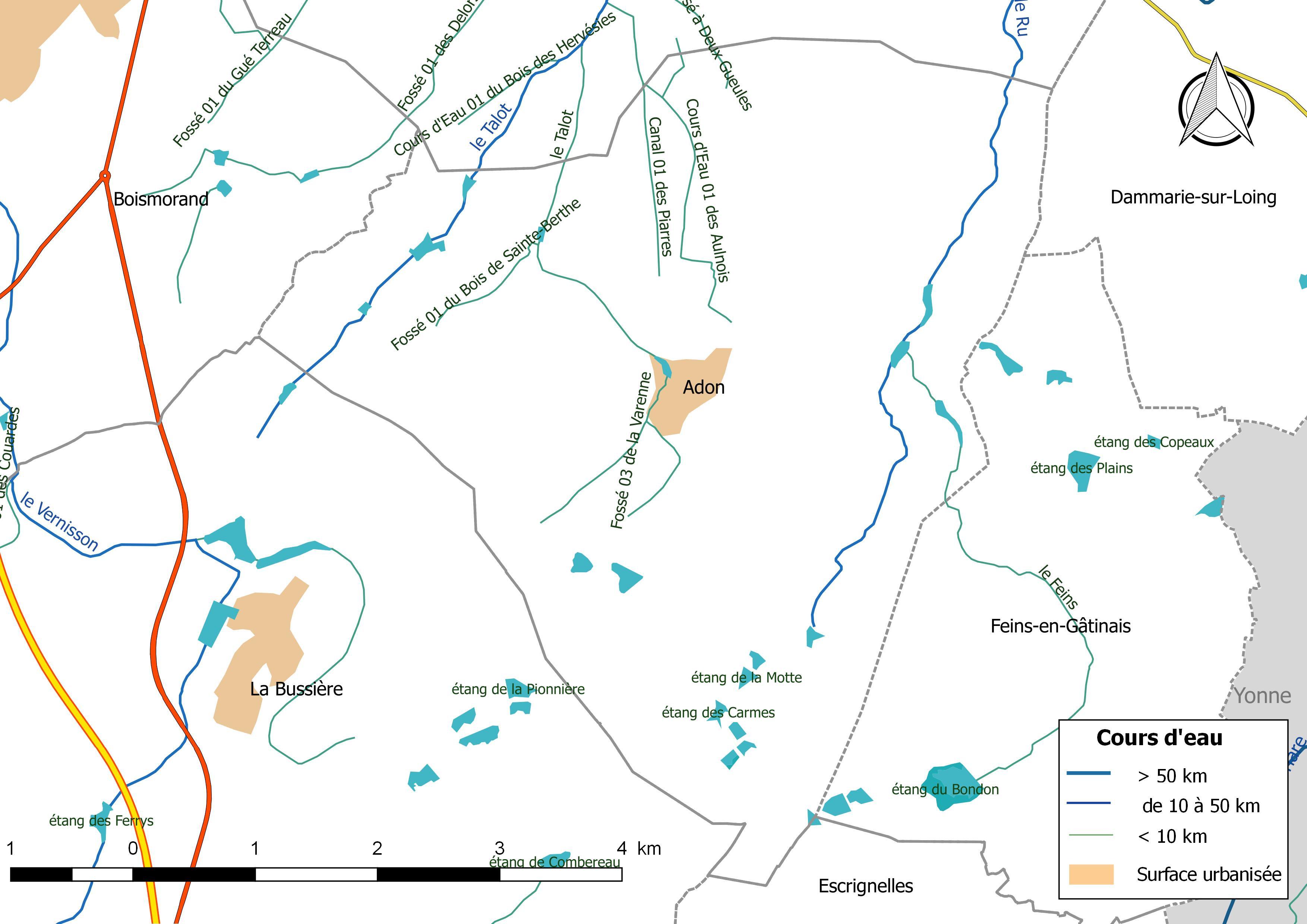 Carte du réseau hydrographique de la commune de Adon (France).